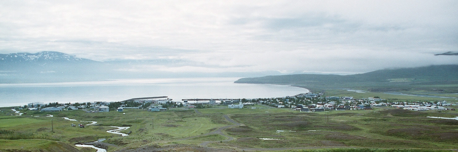 Dalvík depuis une hauteur au Nord-Ouest, en 2005 Dalvík from a height in northwest, en 2005